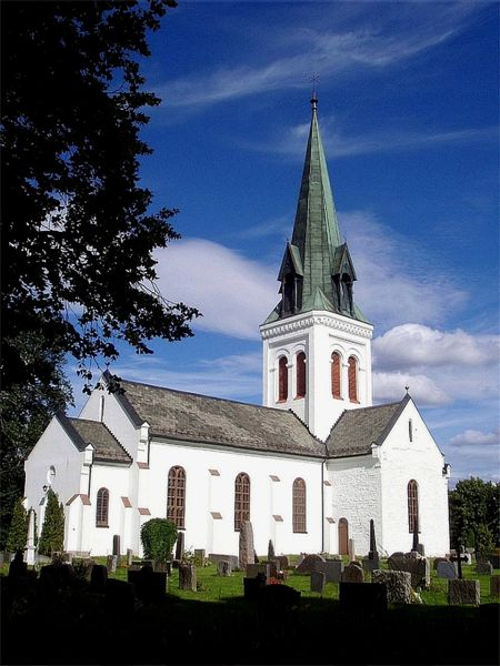 Eidsvoll kirke.